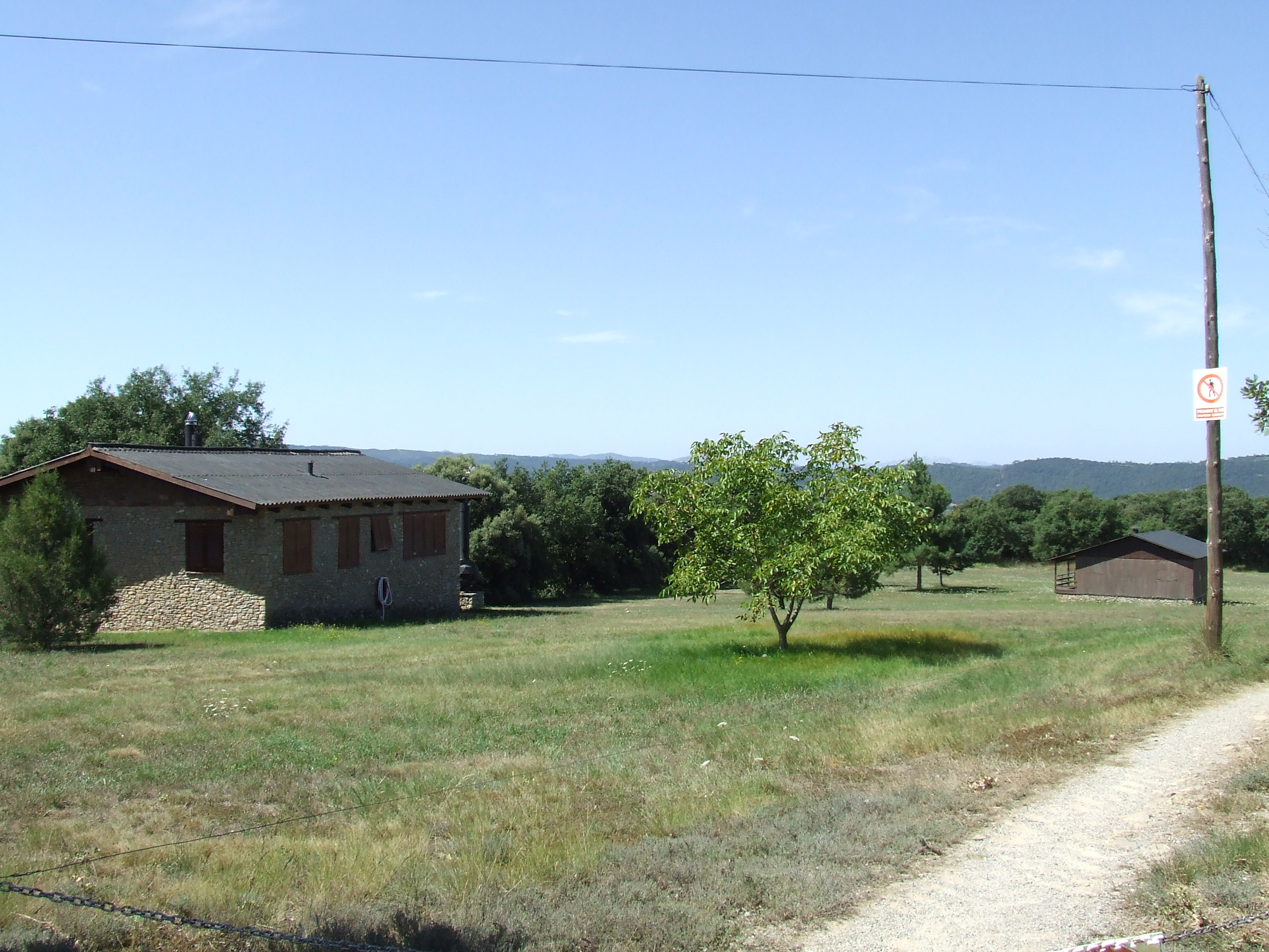 Les Cases de Fusta (Castellcir, Moianès)